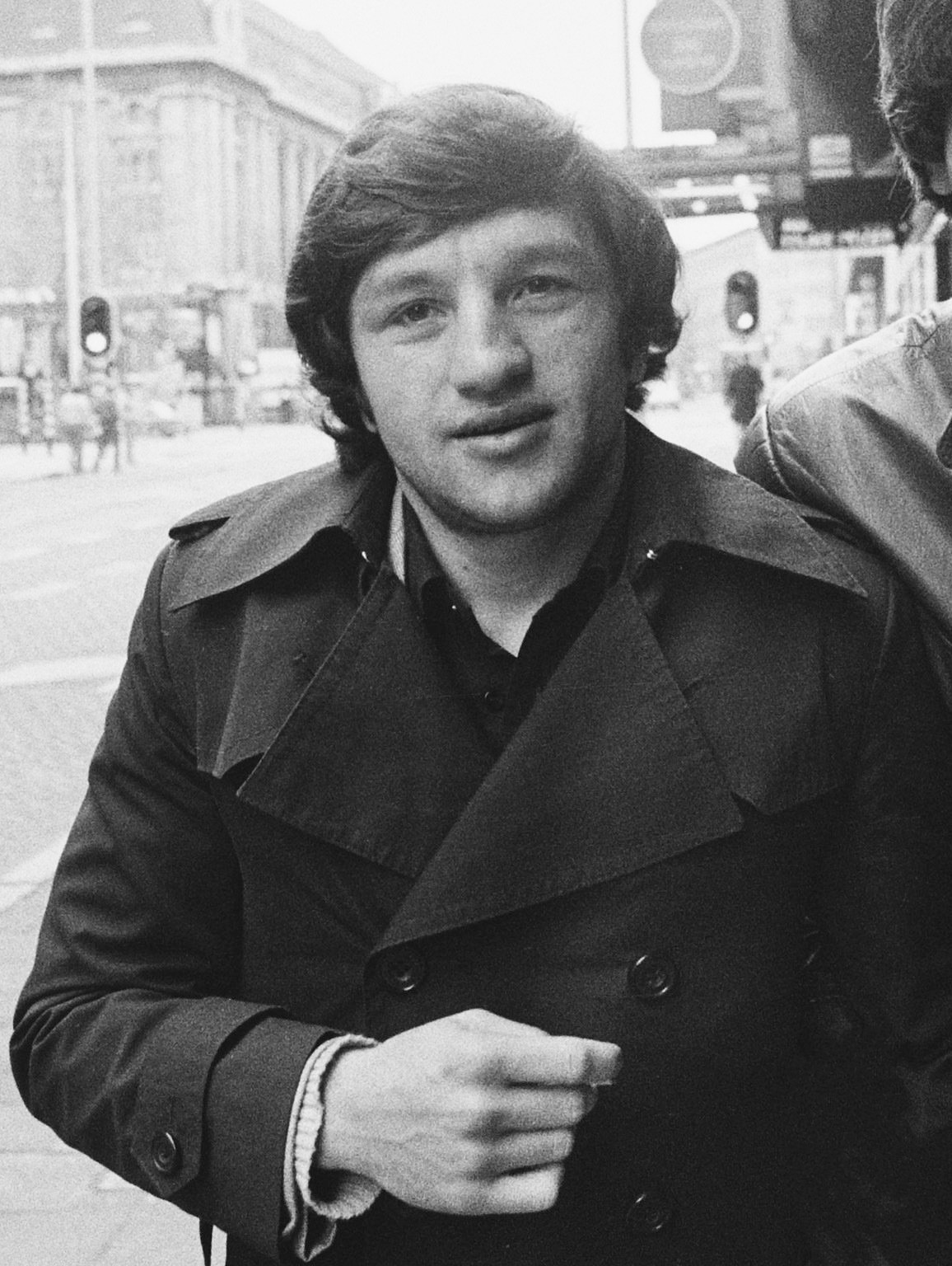 Collectie / Archief : Fotocollectie Anefo Reportage / Serie : [ onbekend ] Beschrijving : Vitaly Daraselia Datum : 21 april 1981 Trefwoorden : sport, voetballers Persoonsnaam : Dynamo Tiflis Instellingsnaam : Europa Cup, Feyenoord Fotograaf : Dijk, Hans van / Anefo Auteursrechthebbende : Nationaal Archief Materiaalsoort : Negatief (zwart/wit) Nummer archiefinventaris : bekijk toegang 2.24.01.05 Bestanddeelnummer : 931-4420